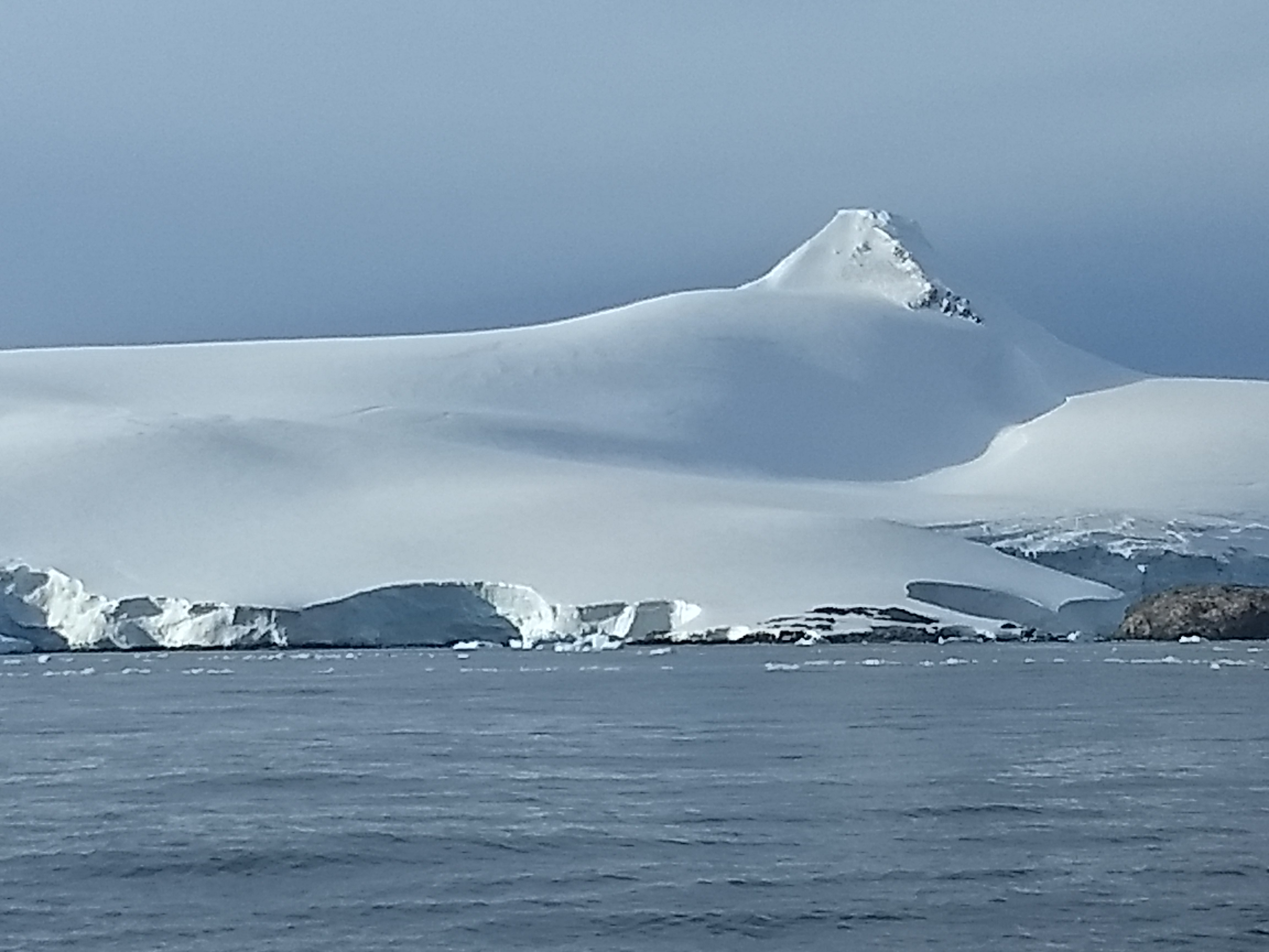 Monte Jacquinot cercano a la Base Antártica Bernardo O' higgins (CHILE)